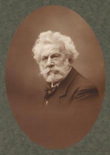 Nicolas Camille Flammarion (1842-1925)